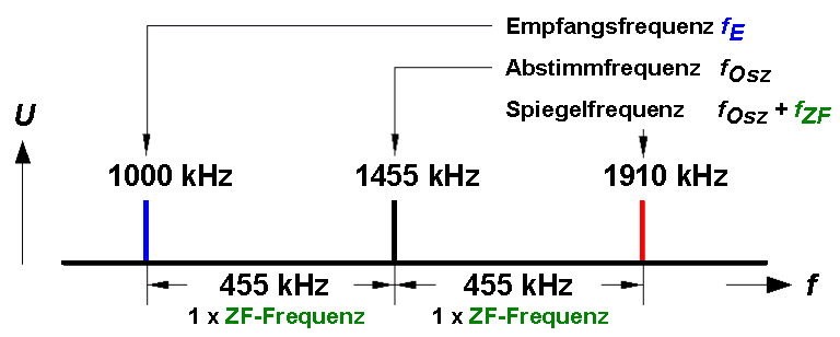 Überlagerungsempfänger Spiegelfrequen